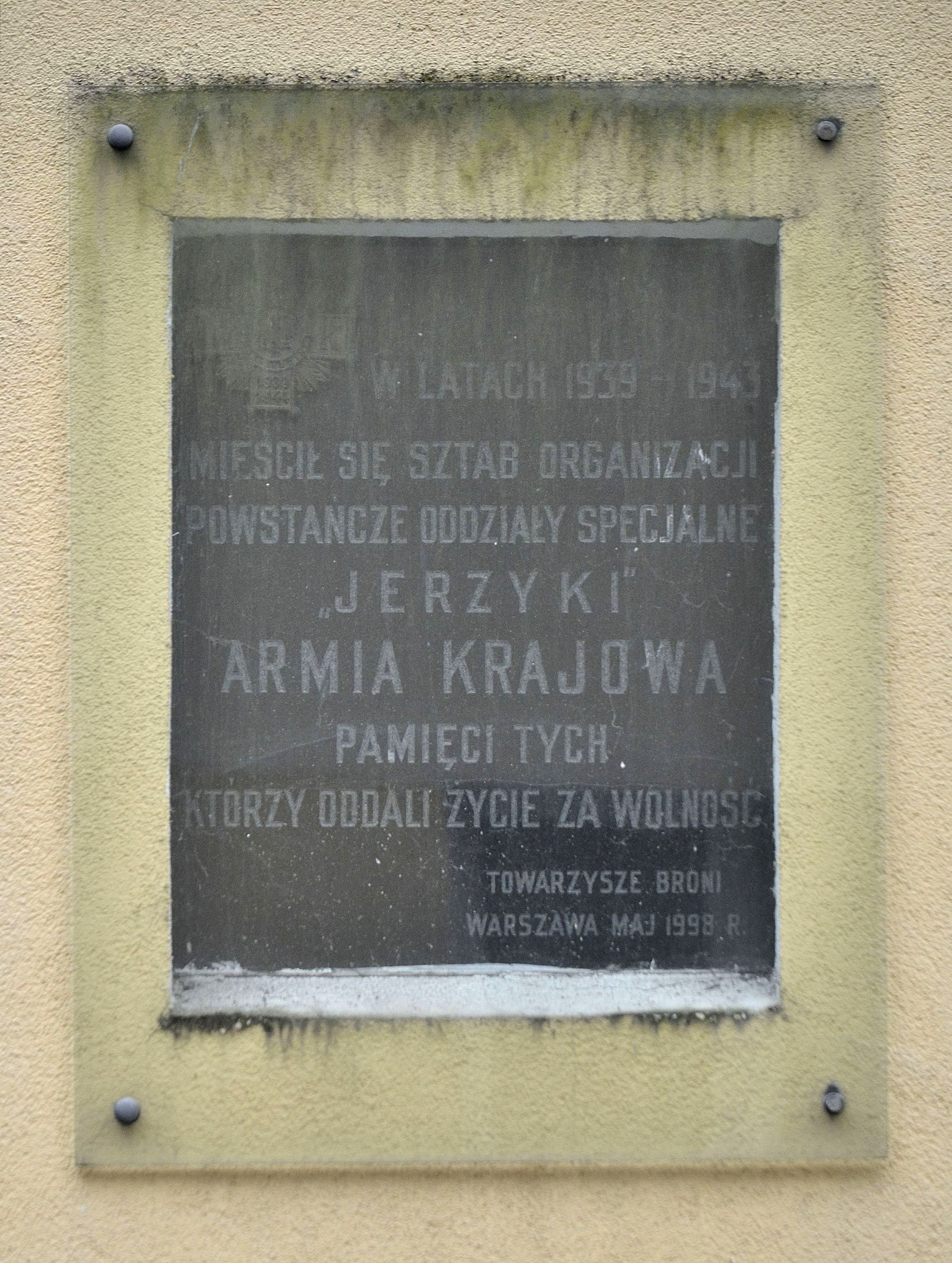 Tablica upamiętniająca POS "Jerzyki" przy ul. Ludwiki 3 w Warszawie